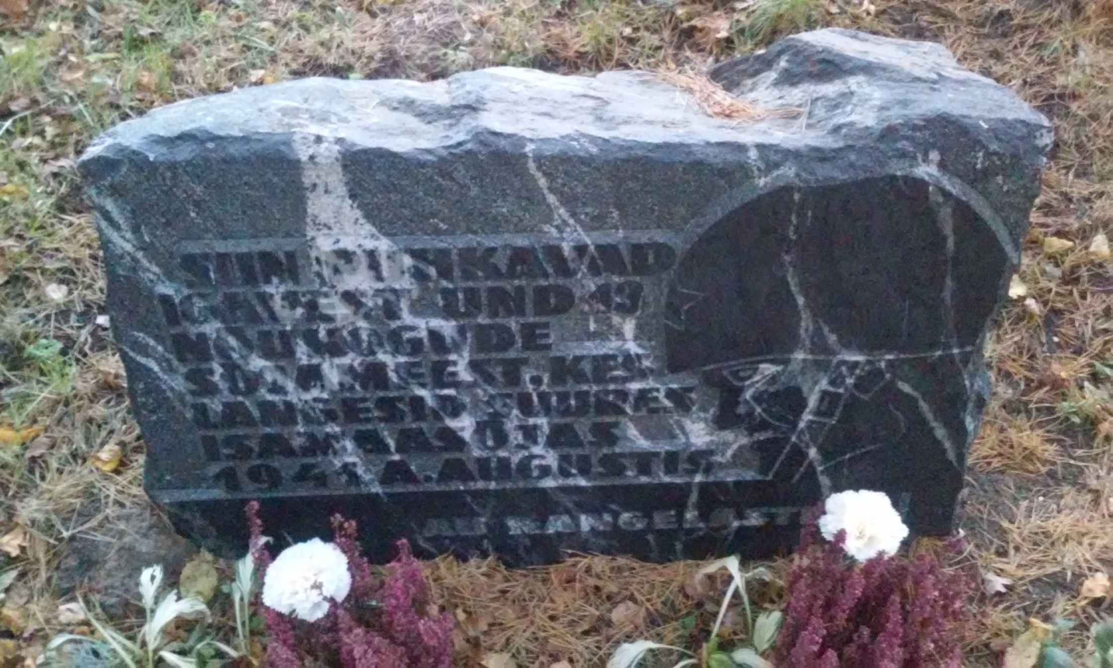 Mälestuskivi.